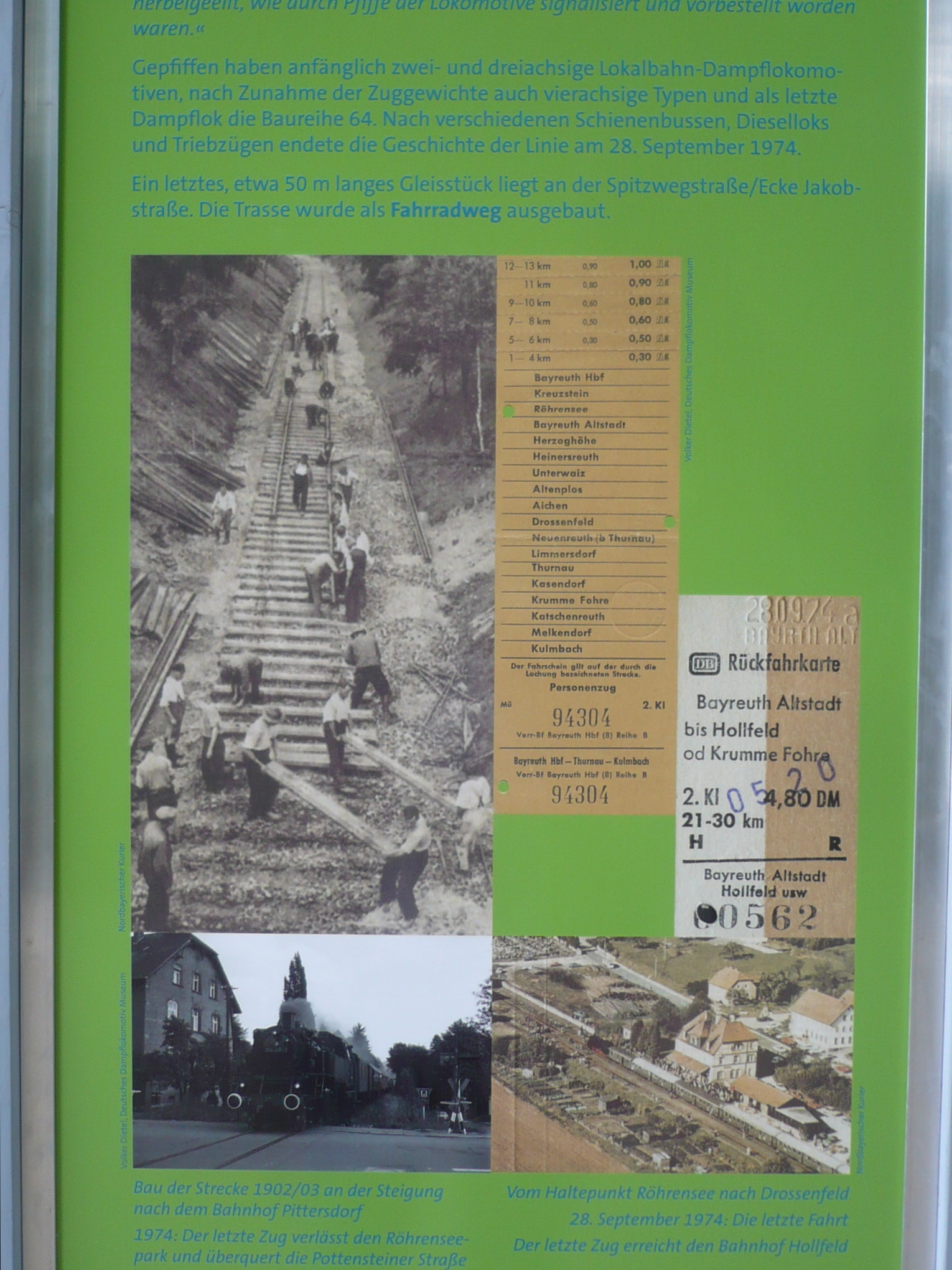 Ausschnitt einer Informationstafel in Bayreuth-Röhrensee zur Bahnstrecke Bayreuth–Hollfeld